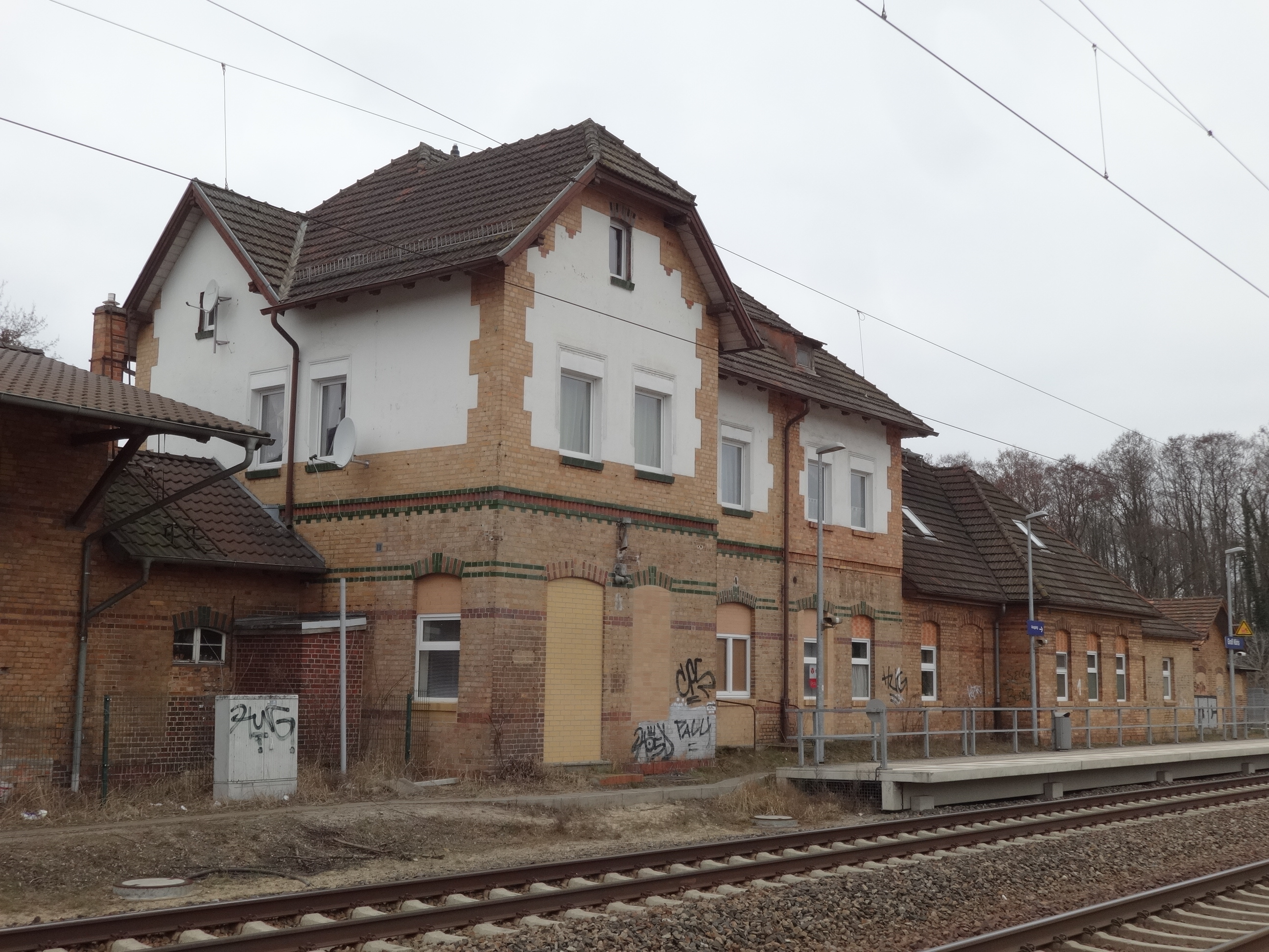 Bahnhofsgebäude von 1897 in Groß Köris an der Bahnstrecke Berlin-Görlitz